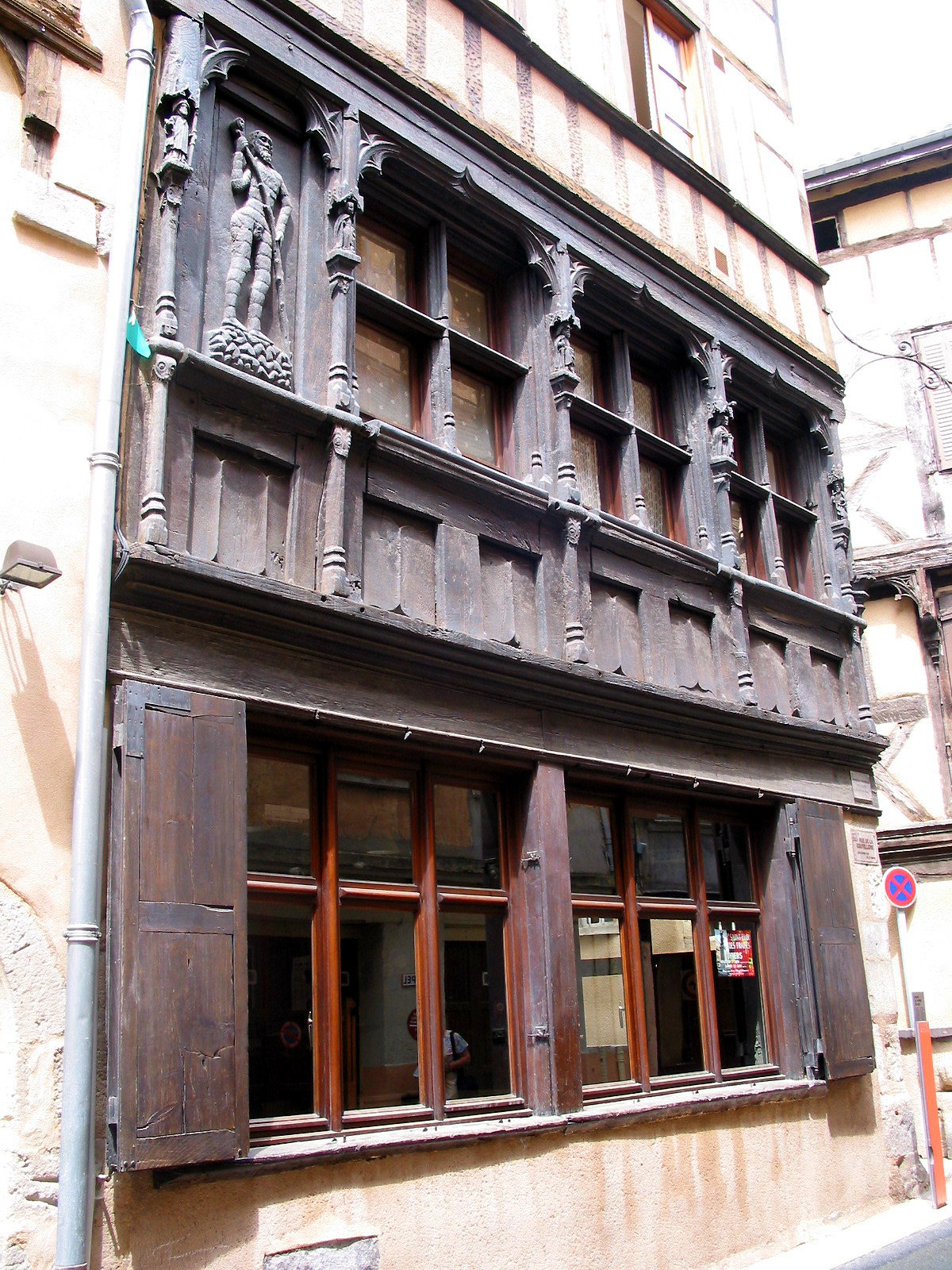 Thiers (Puy-de-Dôme) (France), la maison médievale dite de l'Homme des Bois (XVe siècle).